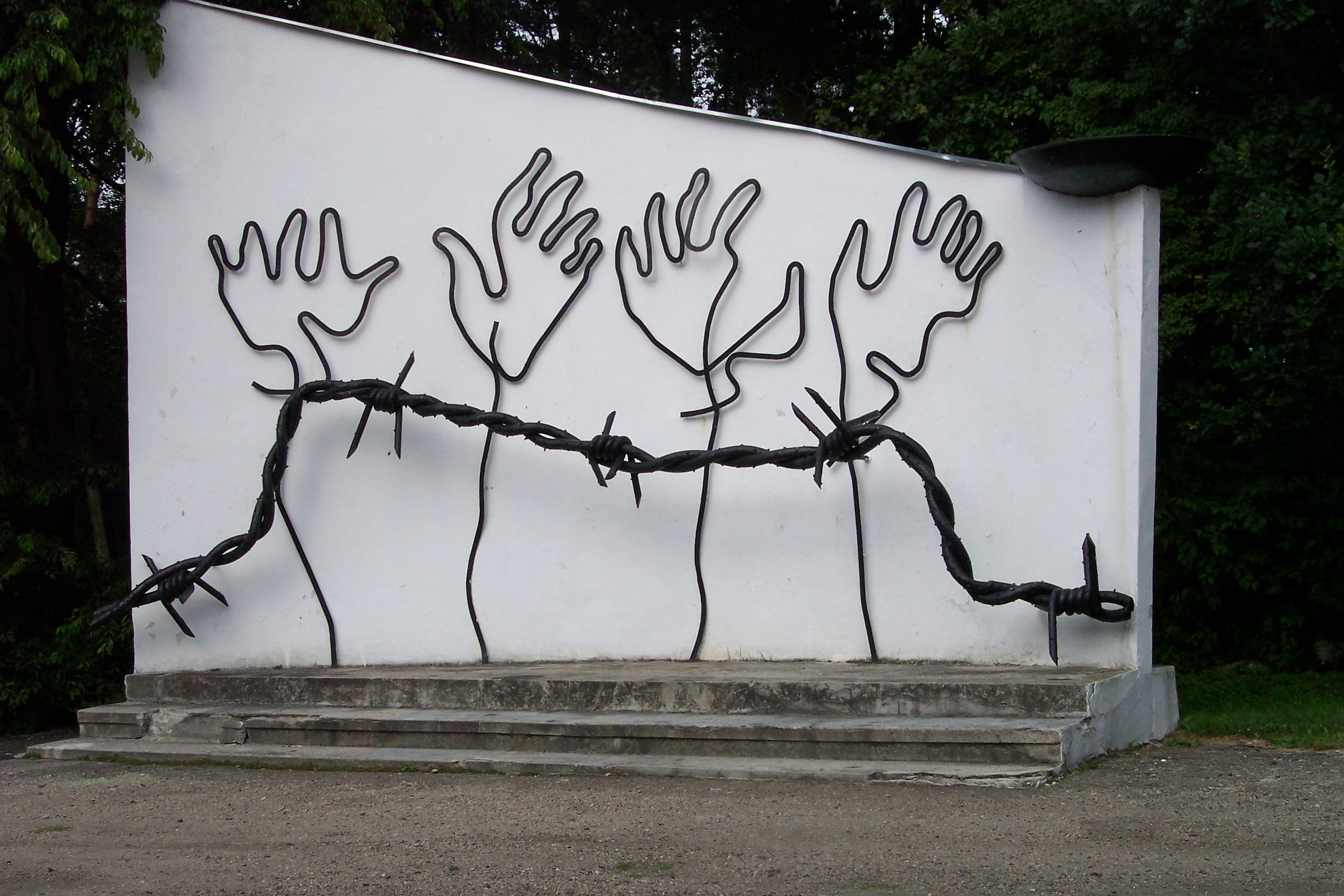 Obóz pracy Blechhammer w Sławięcicach (dzielnicy Kędzierzyna-Koźle)